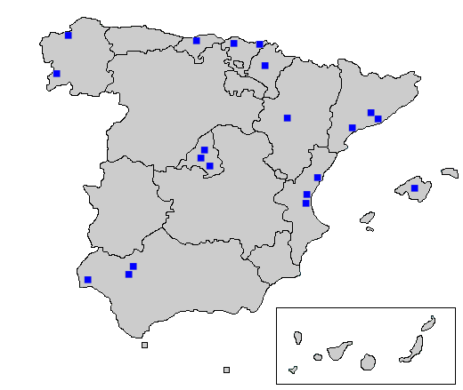 Mapa basado en ; el cual está sujeto a una licencia GDLF. Editado para mostrar las localidades de los equipos de futbol español de la temporada 2006-07